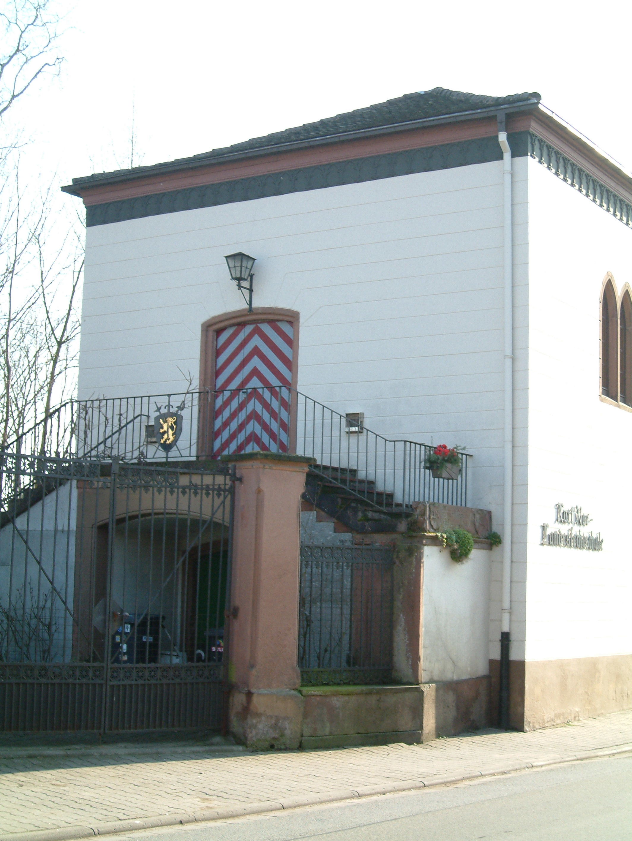 „Fechtschule“ zu Dirmstein samt Eingang des Kellergartens